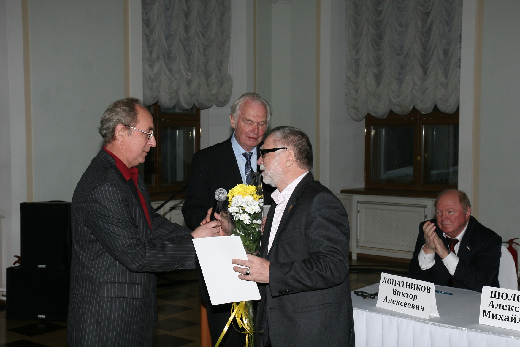 1-го декабря 2011 года в Российской Государственной библиотеке («Дом Пашкова») состоялась торжественная церемония вручения Большой литературной премии России за 2011 год